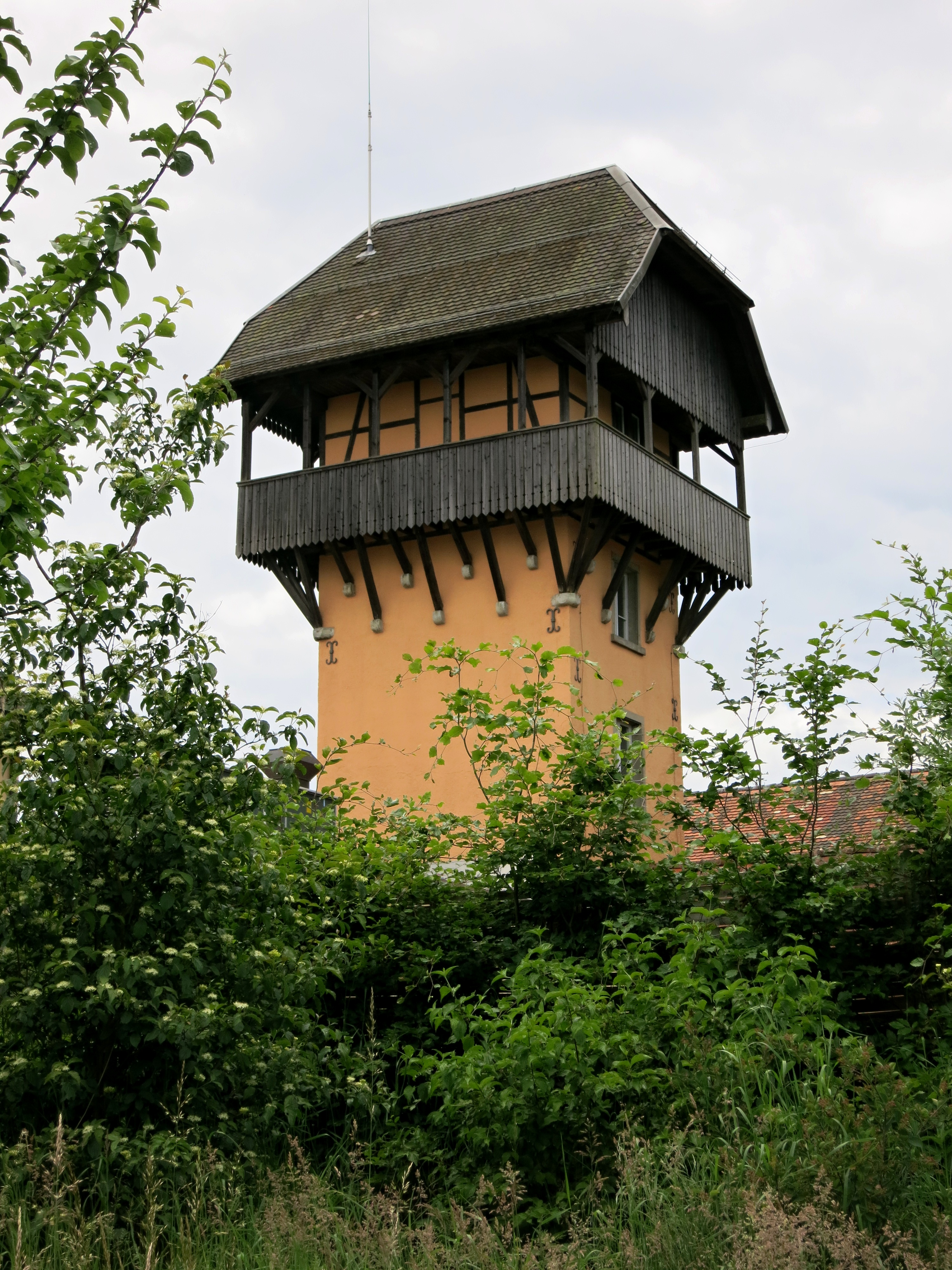 Baldegger Restaurantturm